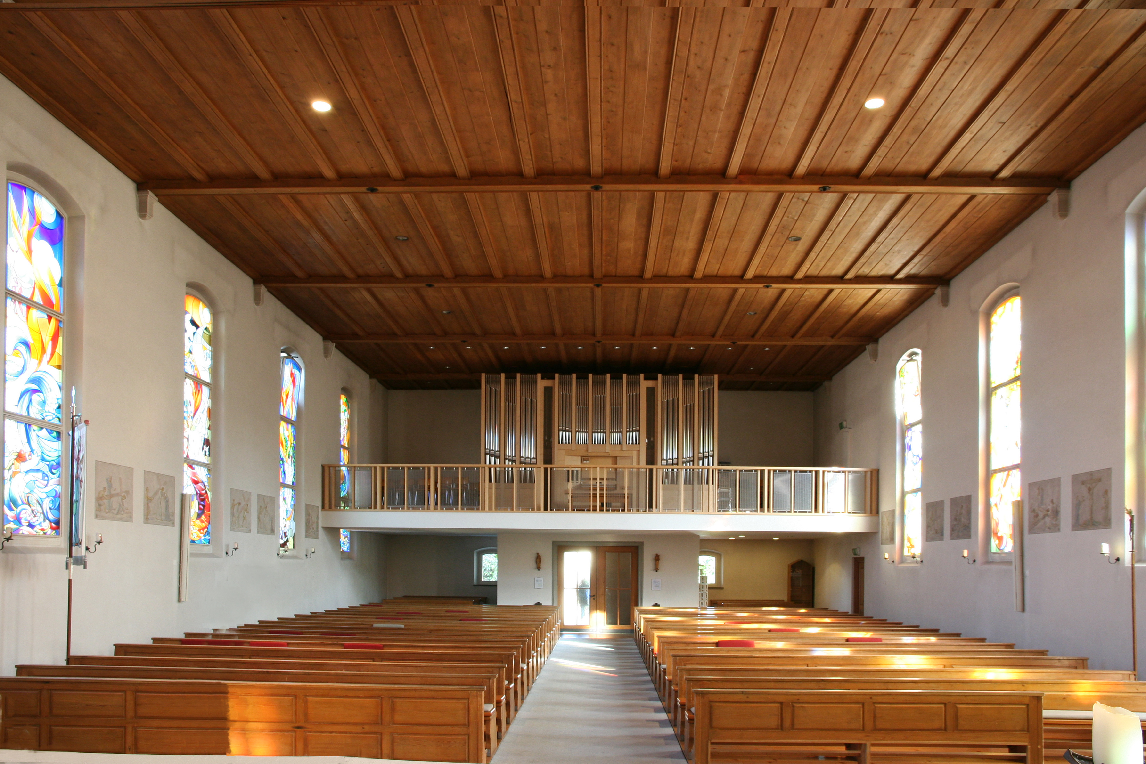 Römisch-katholische Pfarrkirche St. Verena Stäfa, Blick zur Orgel